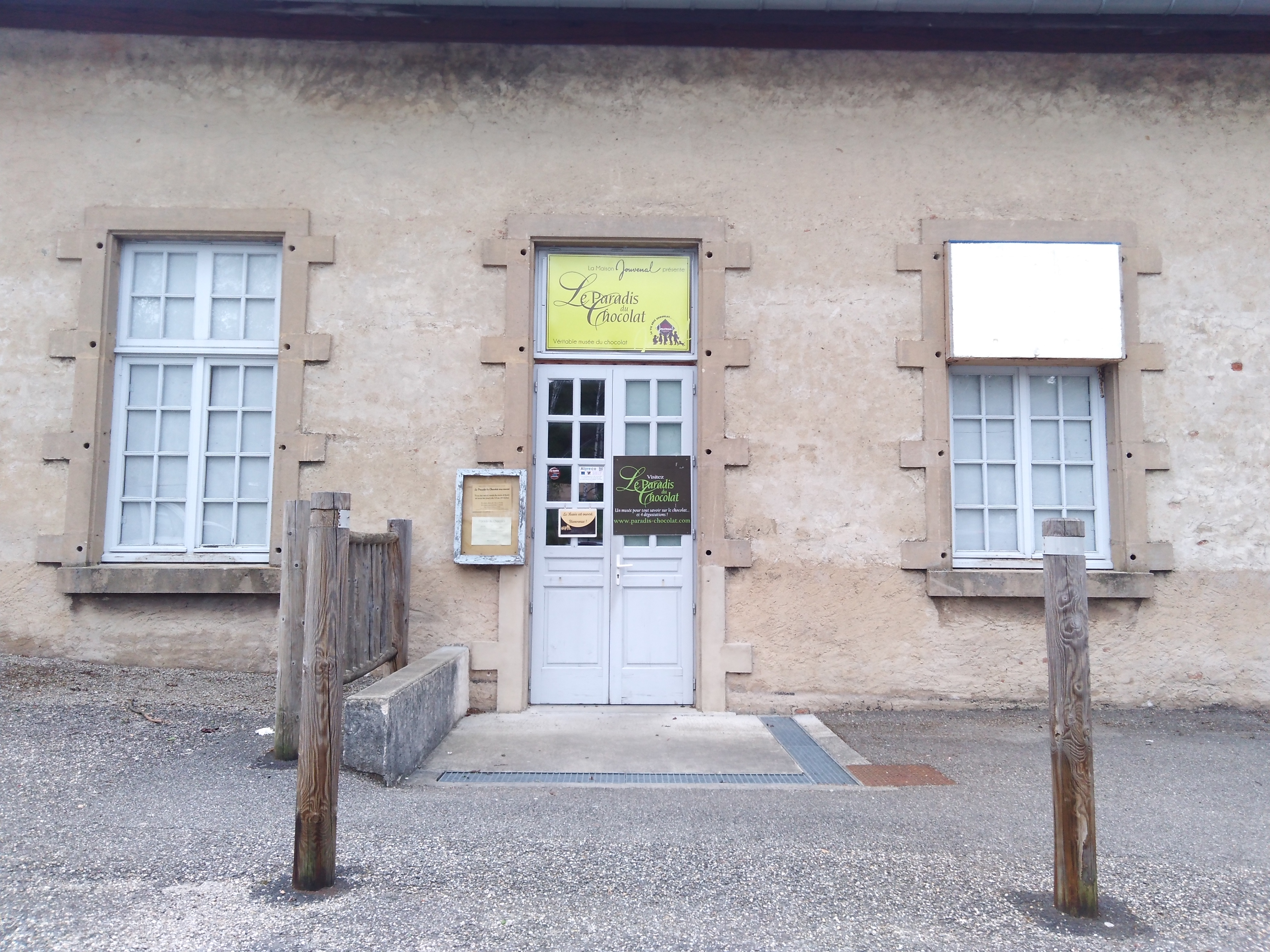 Musée du chocolat (entrée) en avril 2019